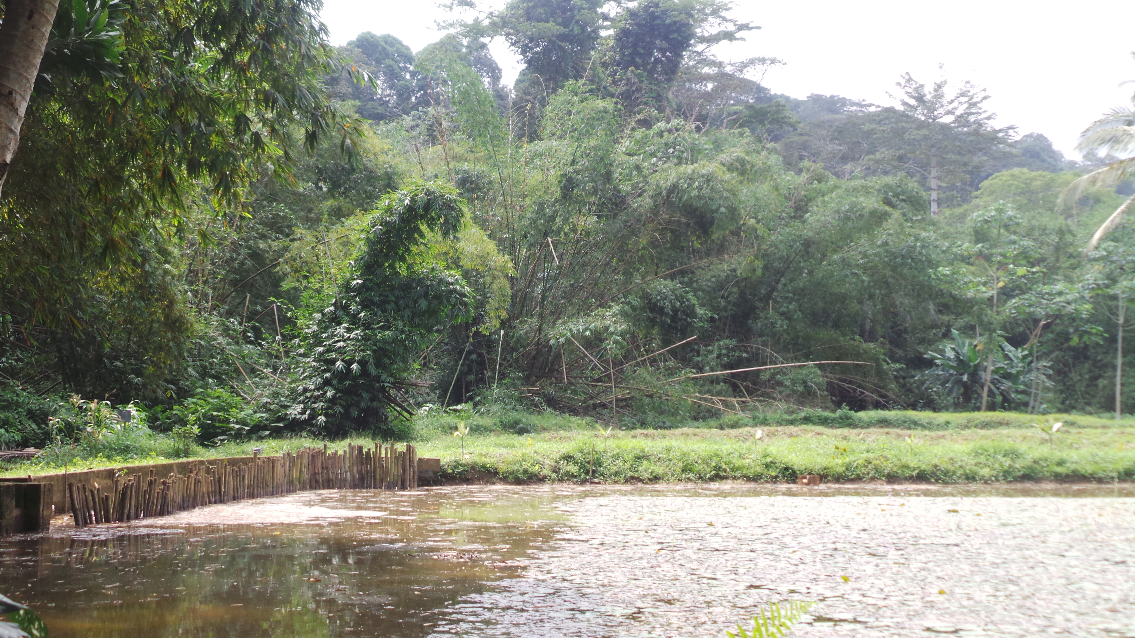 Forêt du banco en Cote d'Ivoire vu de la ferme piscicole